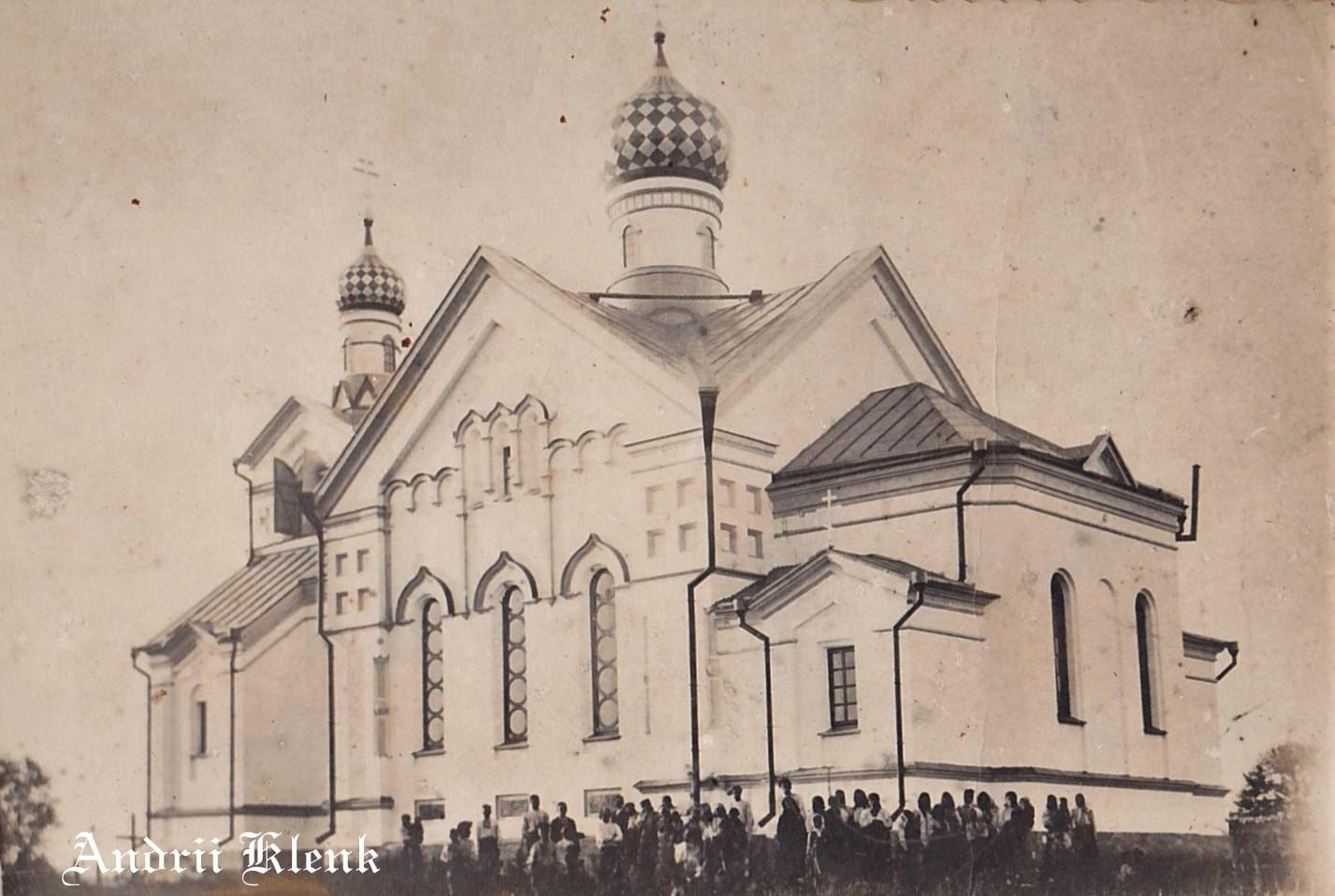 Світлина Богоявленського храму в Ощеві датована 1911 роком